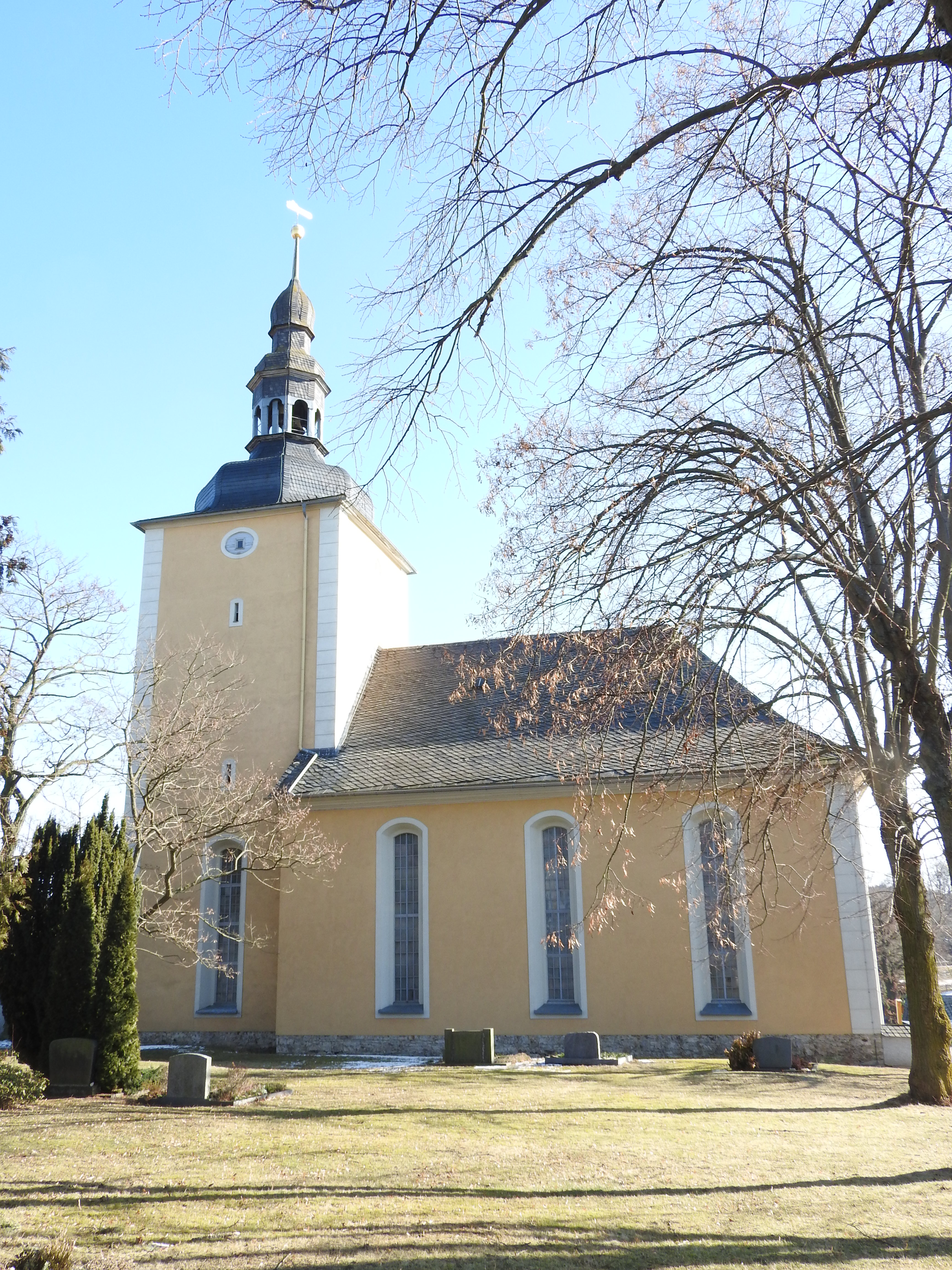 Kirche in Langenwolschendorf, Thüringen